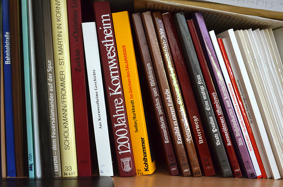 Aufgenommen während der WikiCon 2016 und einer Führung durch die Archivarin Natascha Richter: Zu den Beständen im Stadtarchiv Kornwestheim, das im Rathaus der Stadt untergebracht ist, zählt auch die Bibliothek mit Büchern über die Stadtgeschichte, zu der unter anderem das Buch „Bahnhofstraße (Kornwestheim)“ – Bahnhofstraße - Häuser und Menschen zählt. Die von der Museumsdirektorin Irmgard Sedler und dem Lehrer und Heimatforscher Reinhold Kienzle unter Mitarbeit von Dierk Ott, Marta Gürr, Michael Köpple, Bettina Schlag, Evelyn Otto und Hans Helm herausgegebene Publikation - hier ganz links im Bild im blauen Einband - erschien zur gleichnamigen Ausstellung vom Februar 2005 bis September 2005 im Museum im Kleihus-Bau. Der Begleitband zur Ausstellung veranschaulicht mit zahlreichen historischen Fotografien die Geschichten der Menschen rund um jedes der alten Häuser der Kornwestheimer Bahnhofstraße ...